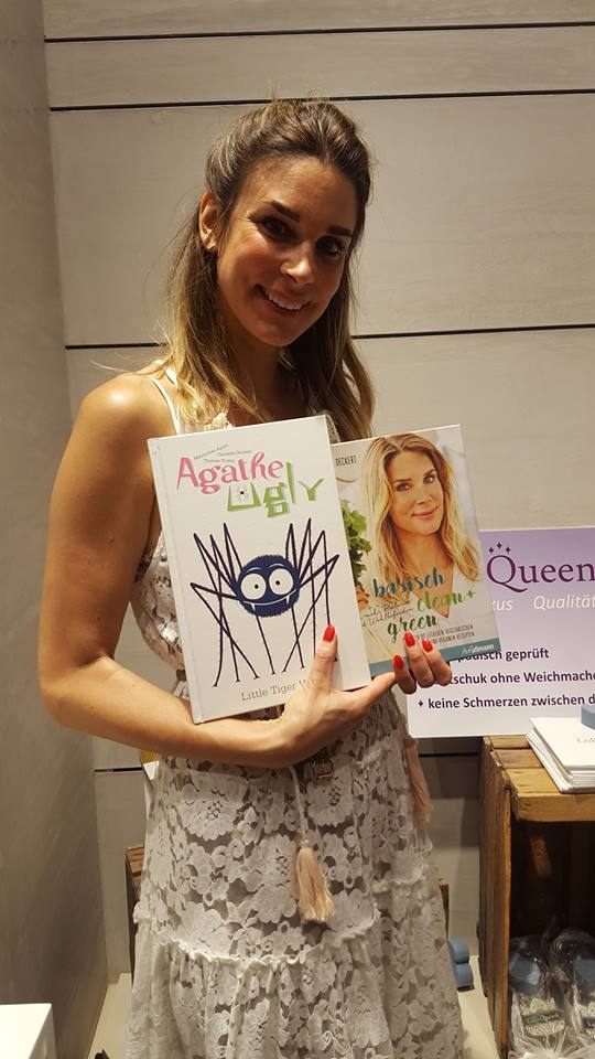 Claudelle Deckert bei Jana Ina’s PopUp Store-Eröffnung